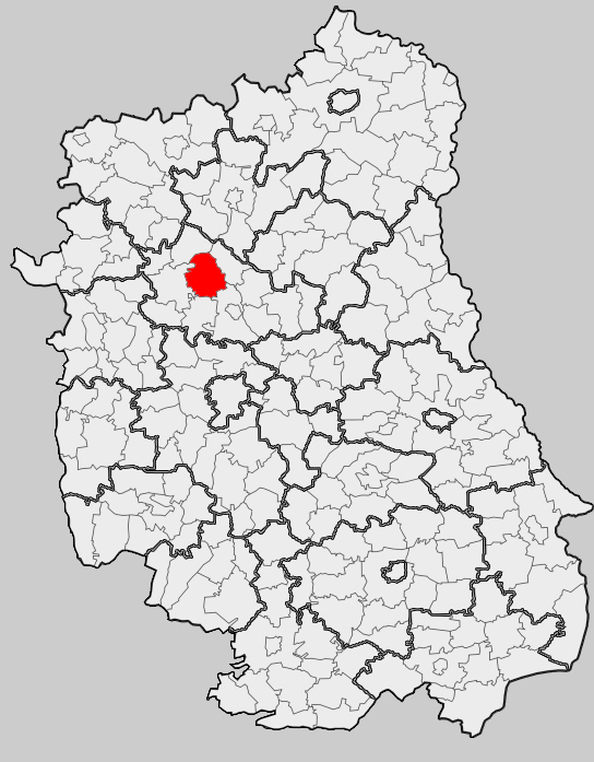 Map of gmina Firlej, Lubartów county, Lublin voivodship Mapa gminy Firlej, powiat lubartowski, województwo lubelskie